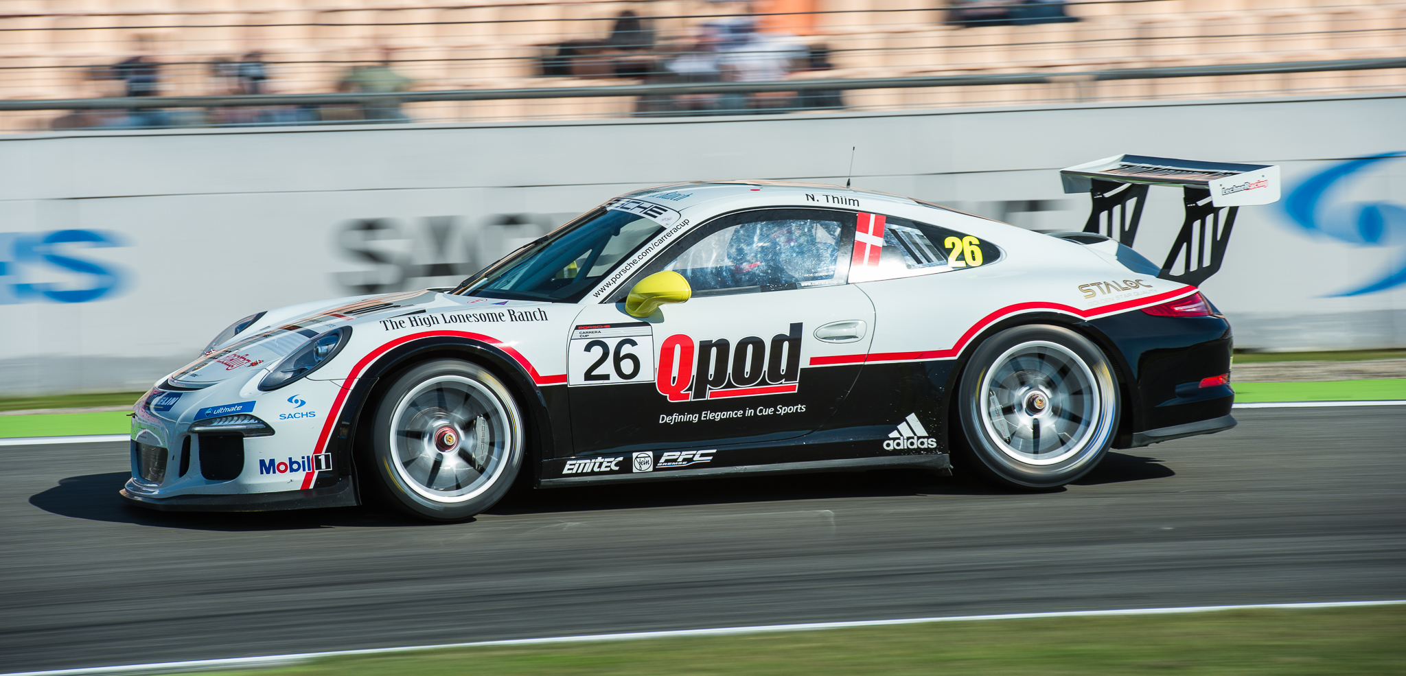 Hockenheimring,Motorsport,Nicki Thiim,Porsche 911 GT3 Cup (Typ 991),Porsche Carrera Cup Deutschland,Walter Lechner Racing Team, Rahmenprogramm DTM